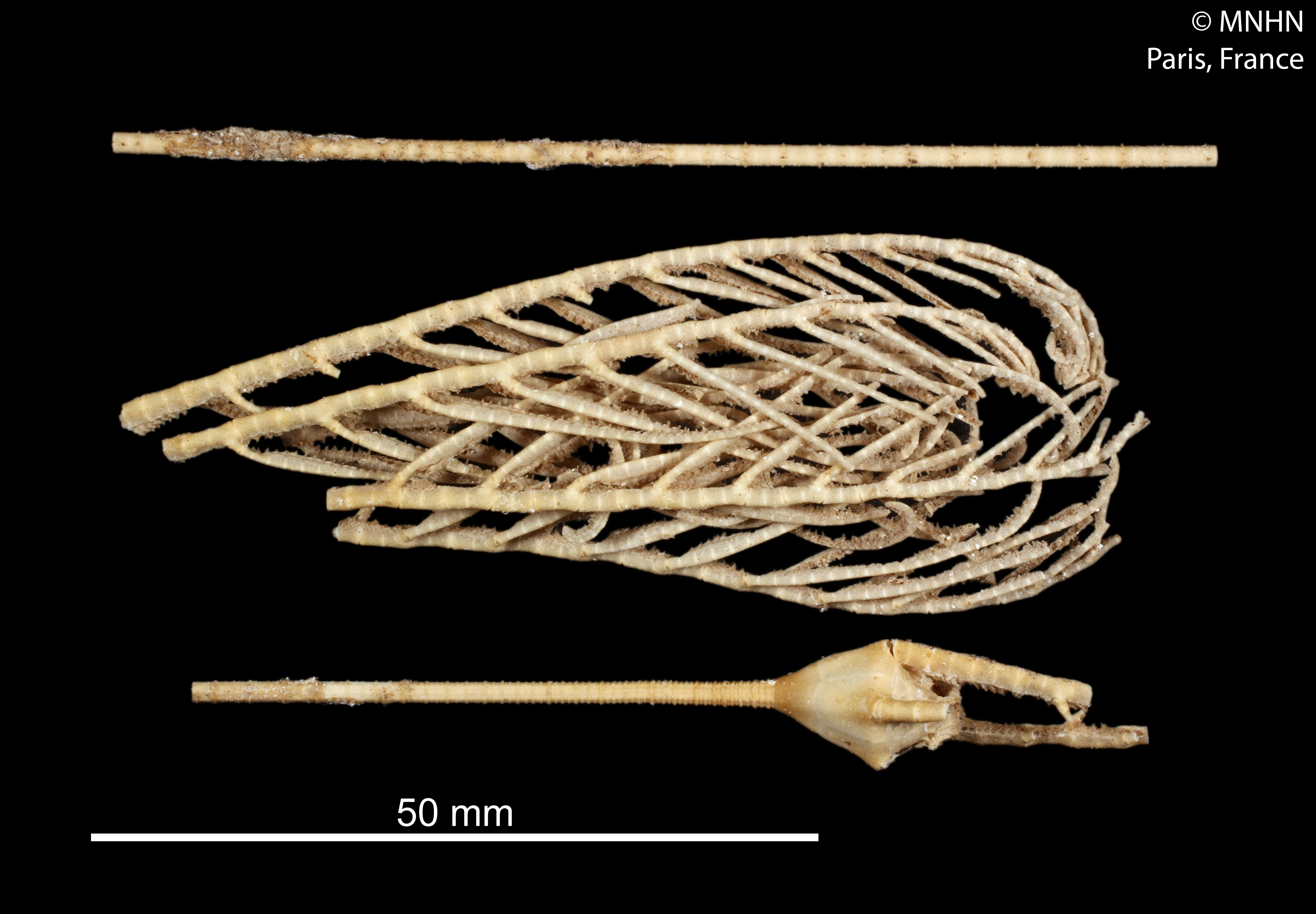 Hyocrinus cyanaeSpécimen MNHN-IE-2013-10366Collection : Échinodermes (IE)Muséum National d'Histoire Naturelle (Paris, France) Origine : Libellé du pays : ILES LOYAUTE Localité/Lieu-dit : Nord de Lifou Nom du collecteur : Vacelet obs. Expédition : CALSUB Navire : Cyana Type : Submersible Numéro de station : PL04 Date de récolte : 1989-02-23 Profondeur (mètres) : 2380 -2697 Coordonnées géographiques : 20° 35' 24 S 167° 11' 59.9892 E